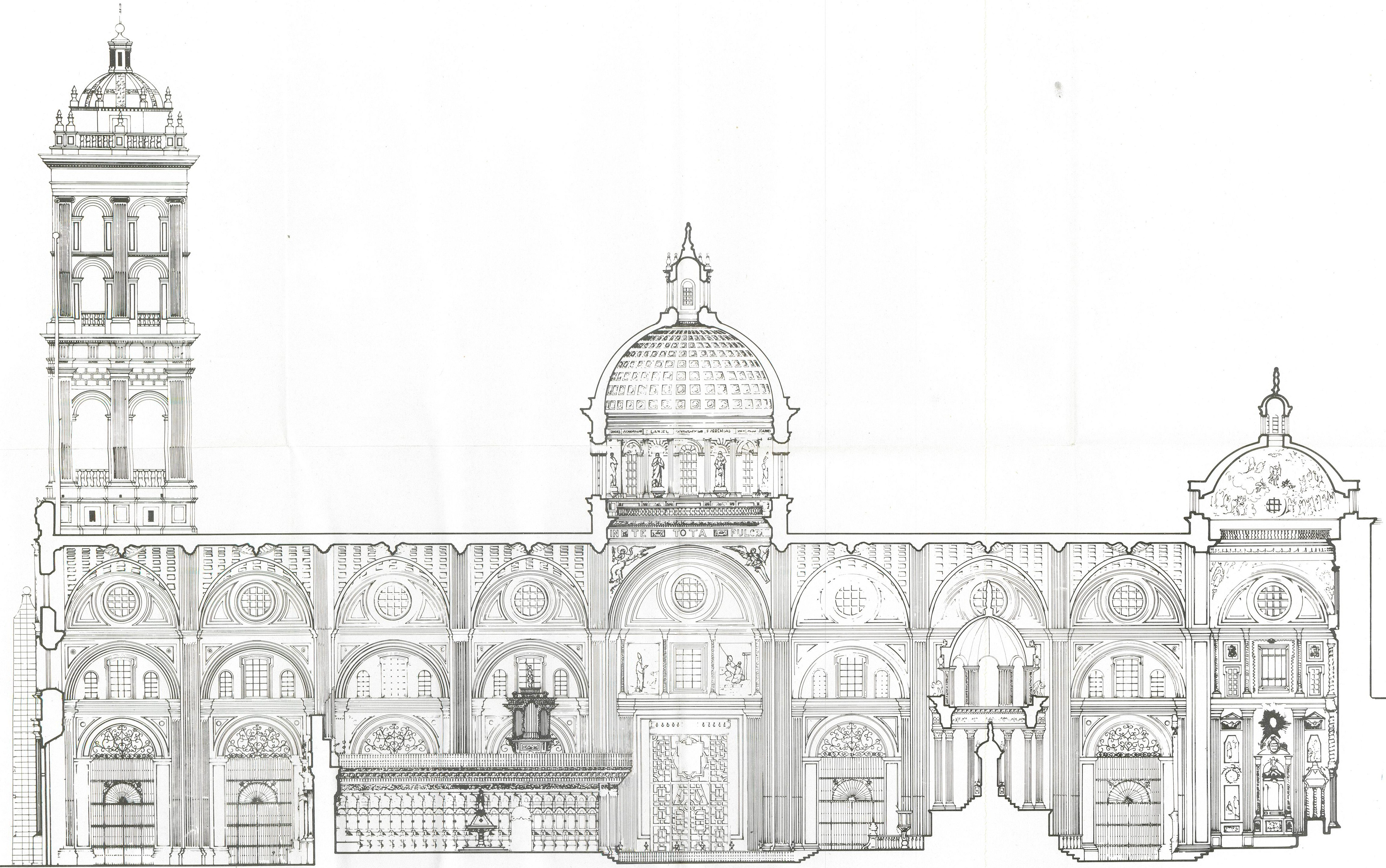 Corte tranversal de la Catedral de Puebla y Sagrario — México.